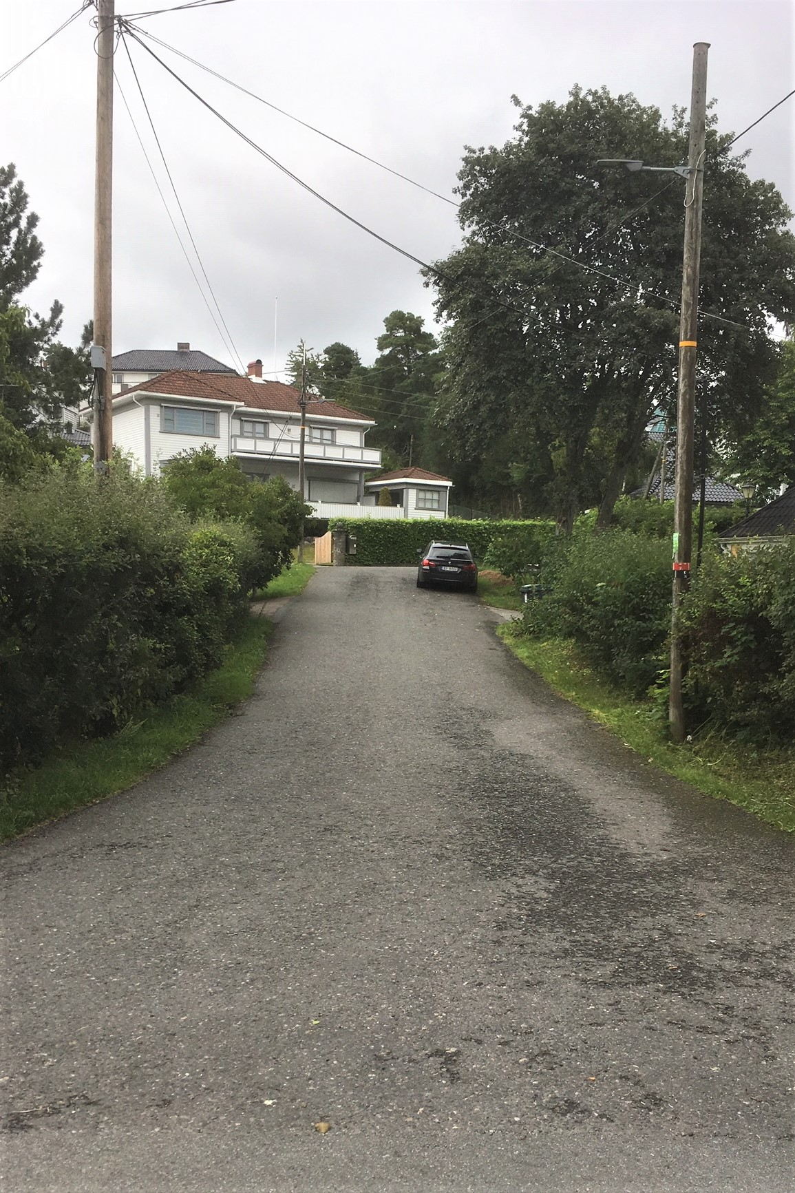 Midttunveien i Oslo august 2019